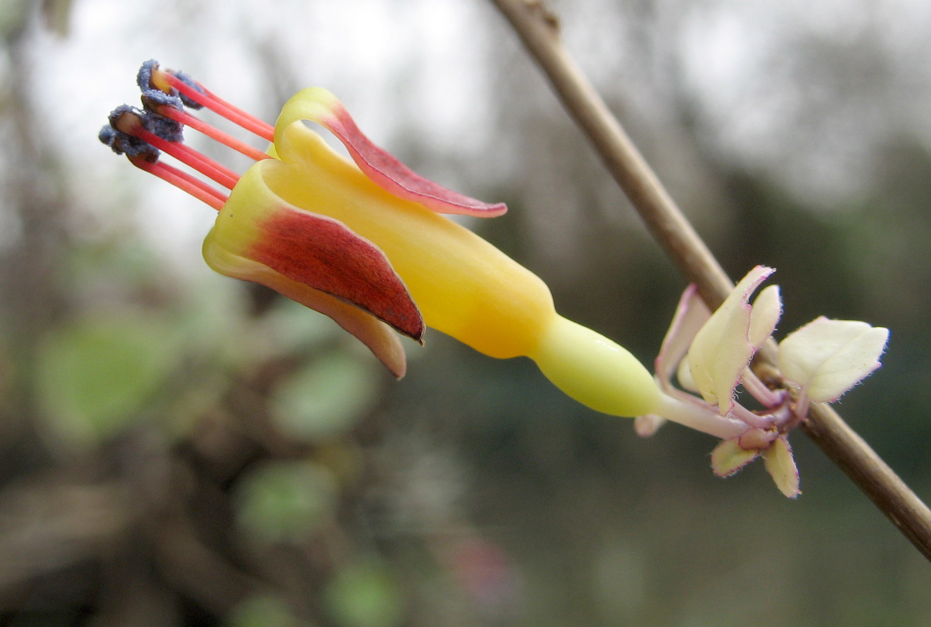 Einzelblüte von Fuchsia procumbens cf. variegata selbst fotografiert 07-03-17